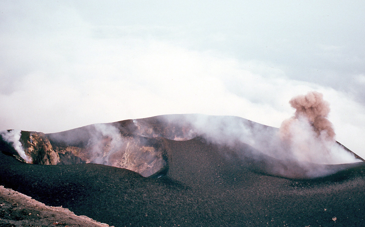 Drei Gipfelkrater des Stromboli (Italien), aufgenommen vom Gipfel mit leicht nach unten gerichteter Blickrichtung. Die blauen Bereiche, die durch die Wolkendecke unterhalb des Gipfels hindurchschimmern, sind daher das Meer.